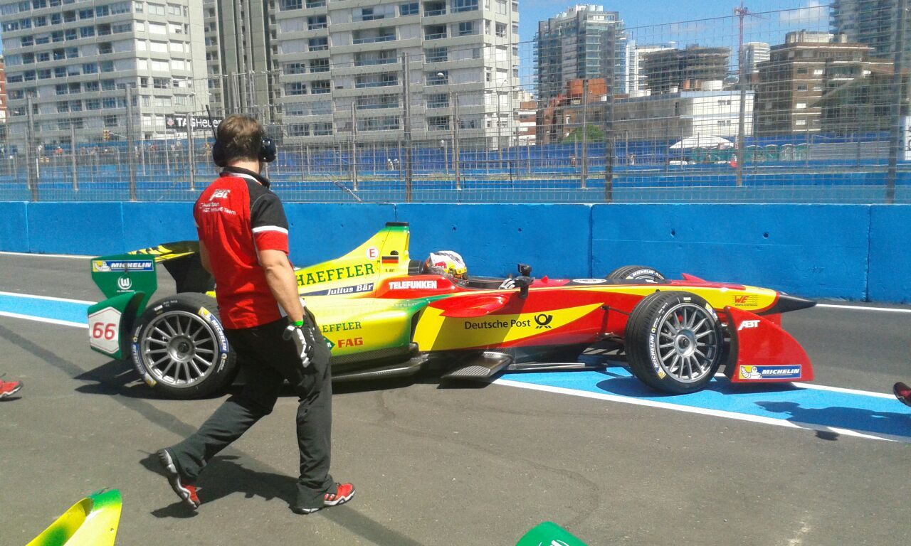 aaaaa